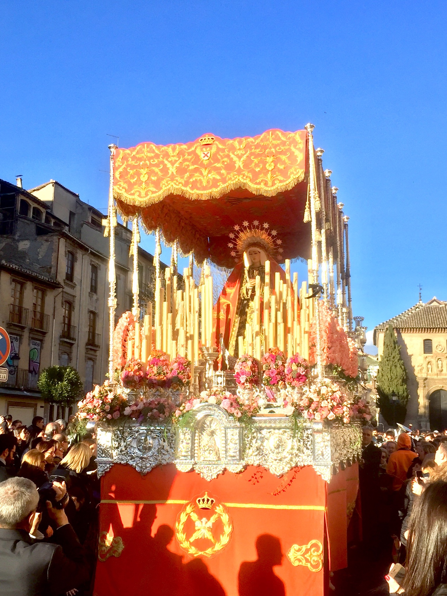 Virgen de los Dolores